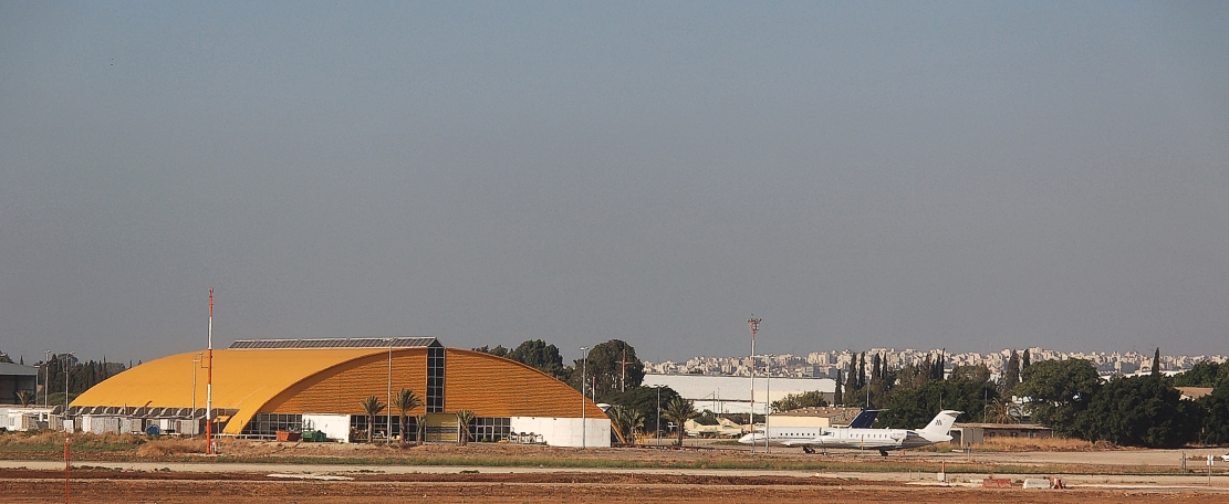 Ben Gurion International Airport 2011